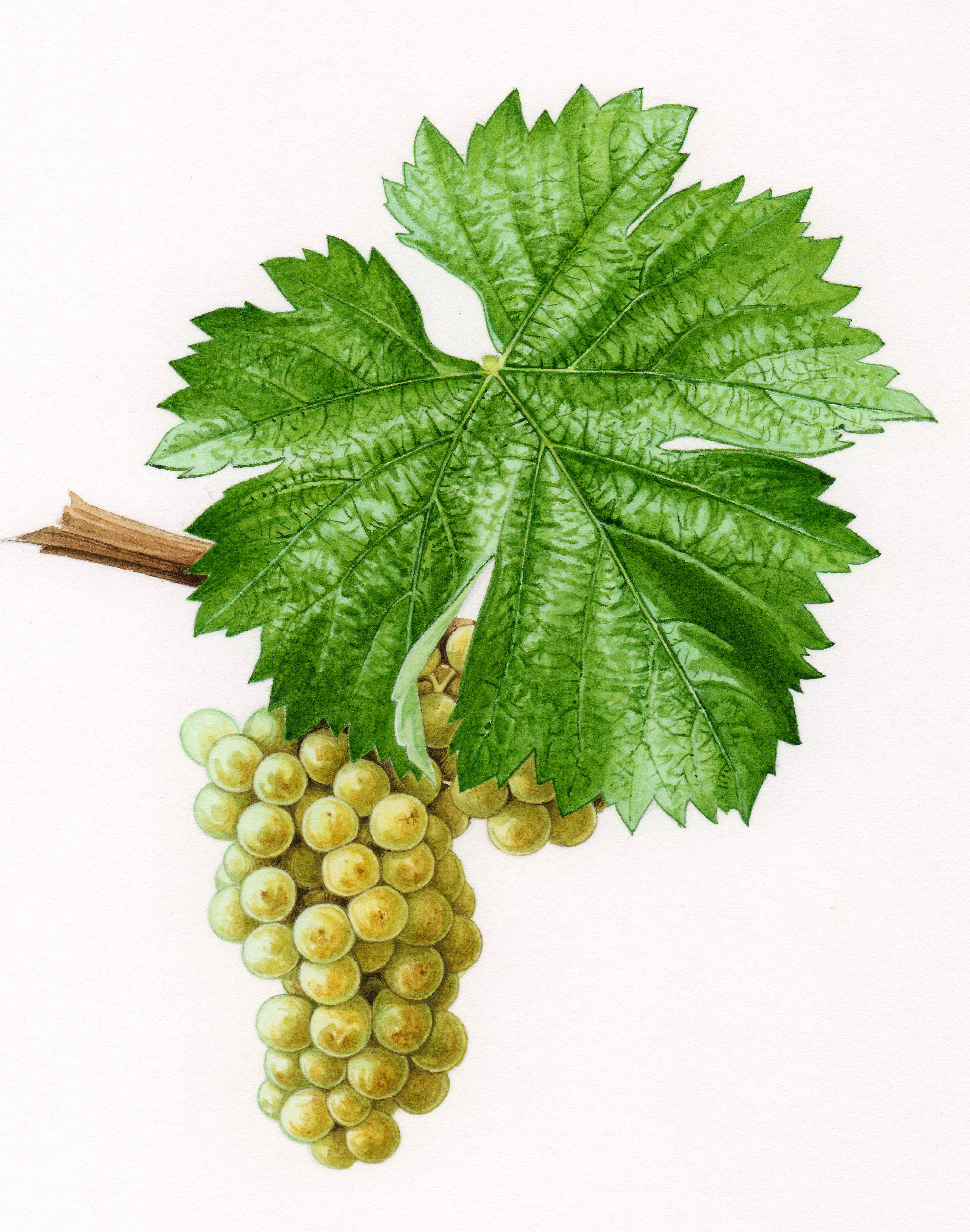 Aquarelle originale pour les Cépages de France (2001)